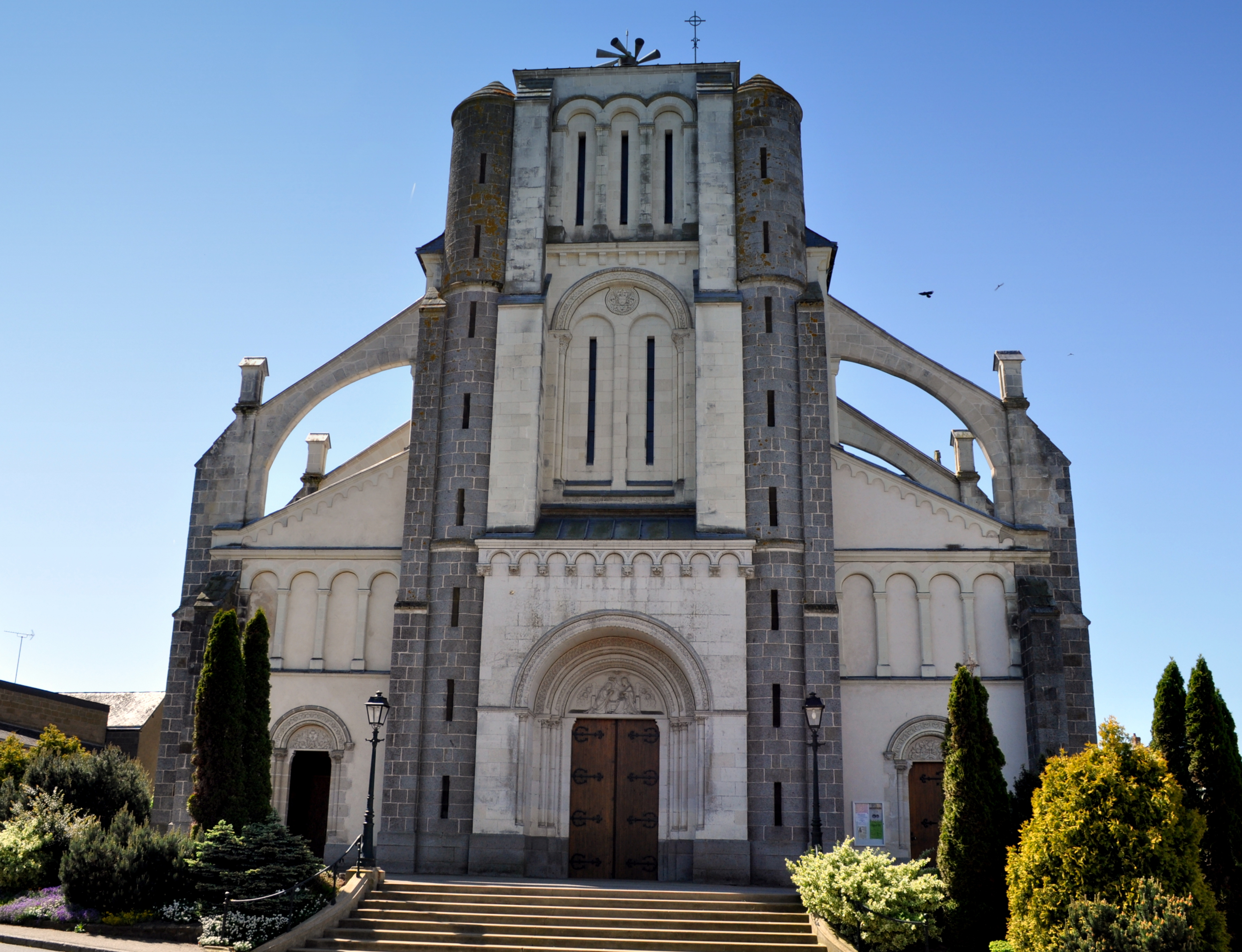 Église de Cossé-le-Vivien (Mayenne, France).